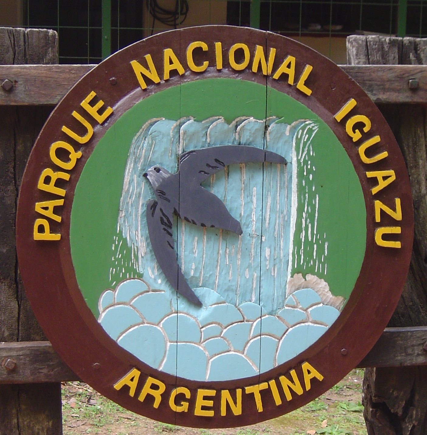 Foto del Logo del Parque Nacional Iguazú